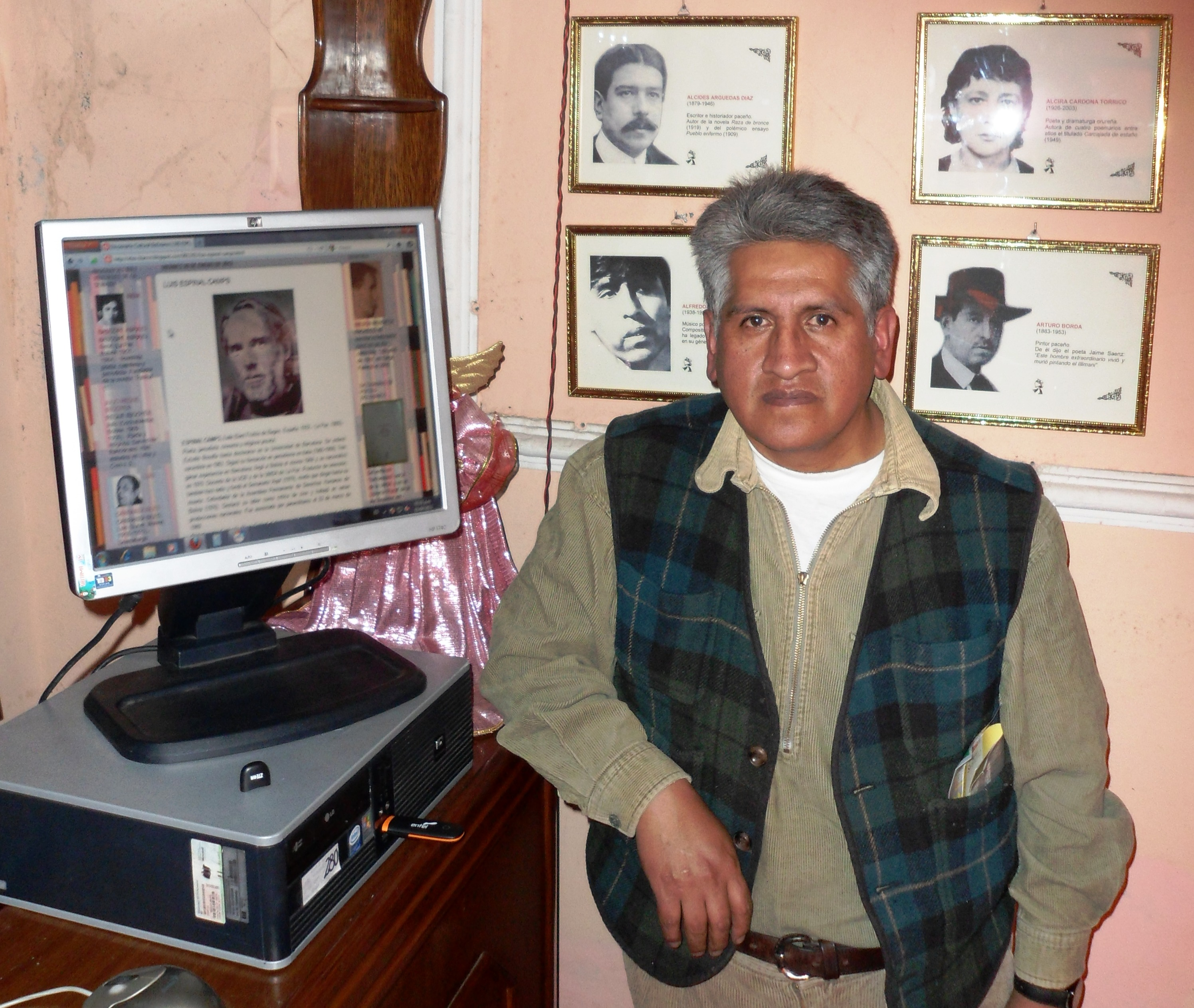 Elías Blanco, investigador, escritor y periodista boliviano en el "Museo del Aparapita" fundado por él.